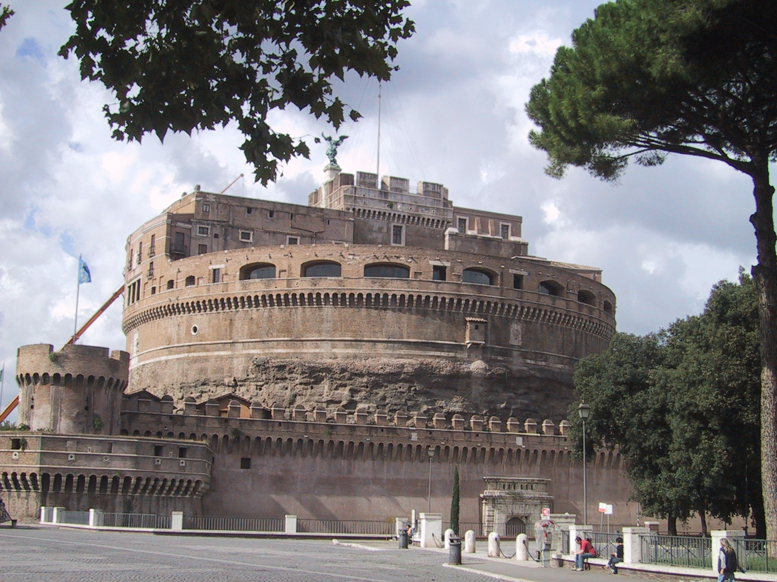 Roma, Hadrian Mausoleum, aka Castel Sant'Angelo. Personal picture - 2005.